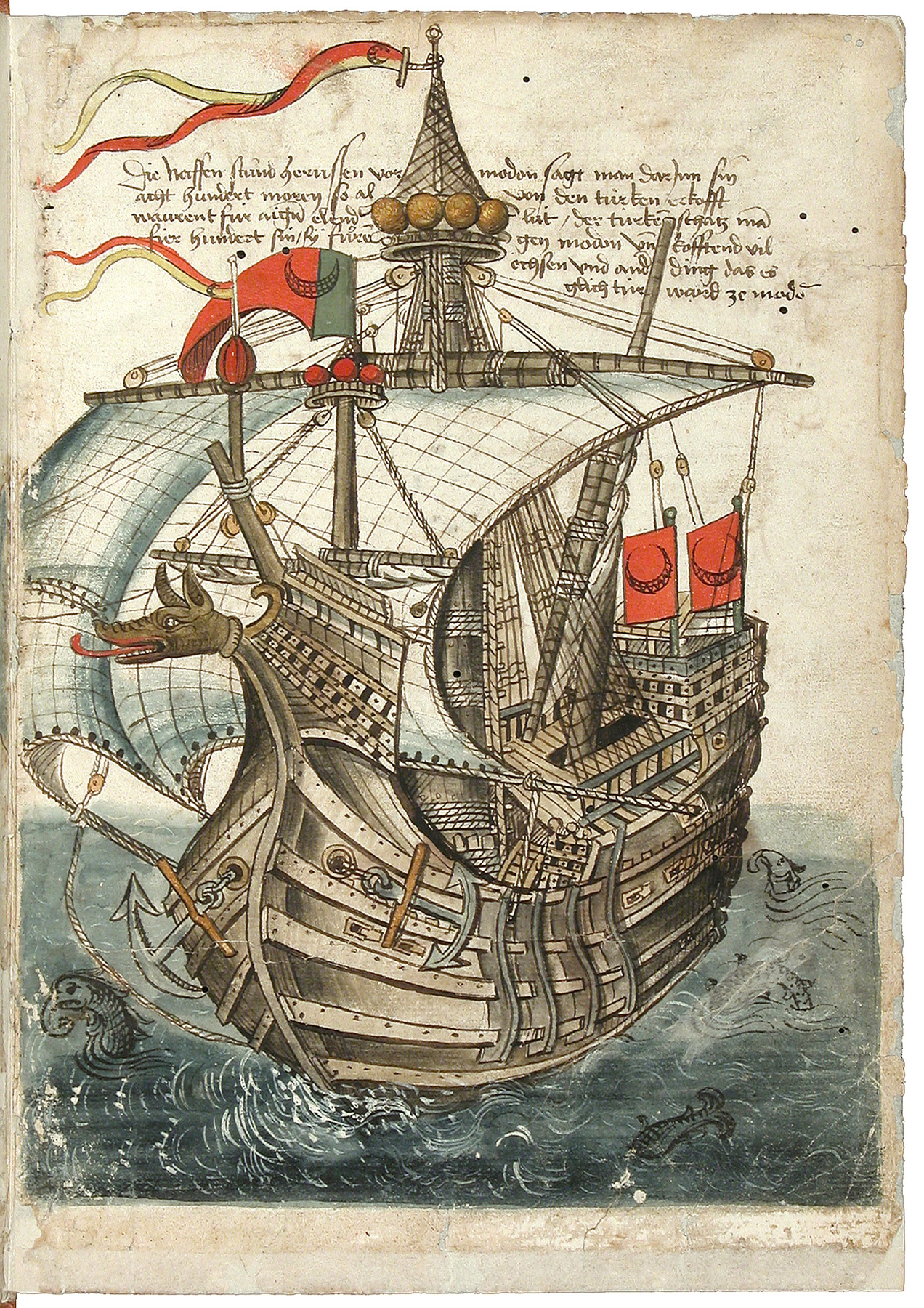 Schilderung einer Pilgerreise von Konstanz nach Jerusalem durch Konrad von Grünenberg, um 1487 Konrad von Grünenberg: Beschreibung der Reise von Konstanz nach Jerusalem - Cod. St. Peter, pap. 32. Handschrift, Bodenseegebiet (Konstanz?), um 1487. II + 53 Blätter, 32x21, mit 31 kolorierten Zeichnungen der Reiseroute von Venedig bis Palästina. Text in alemannischer Mundart.